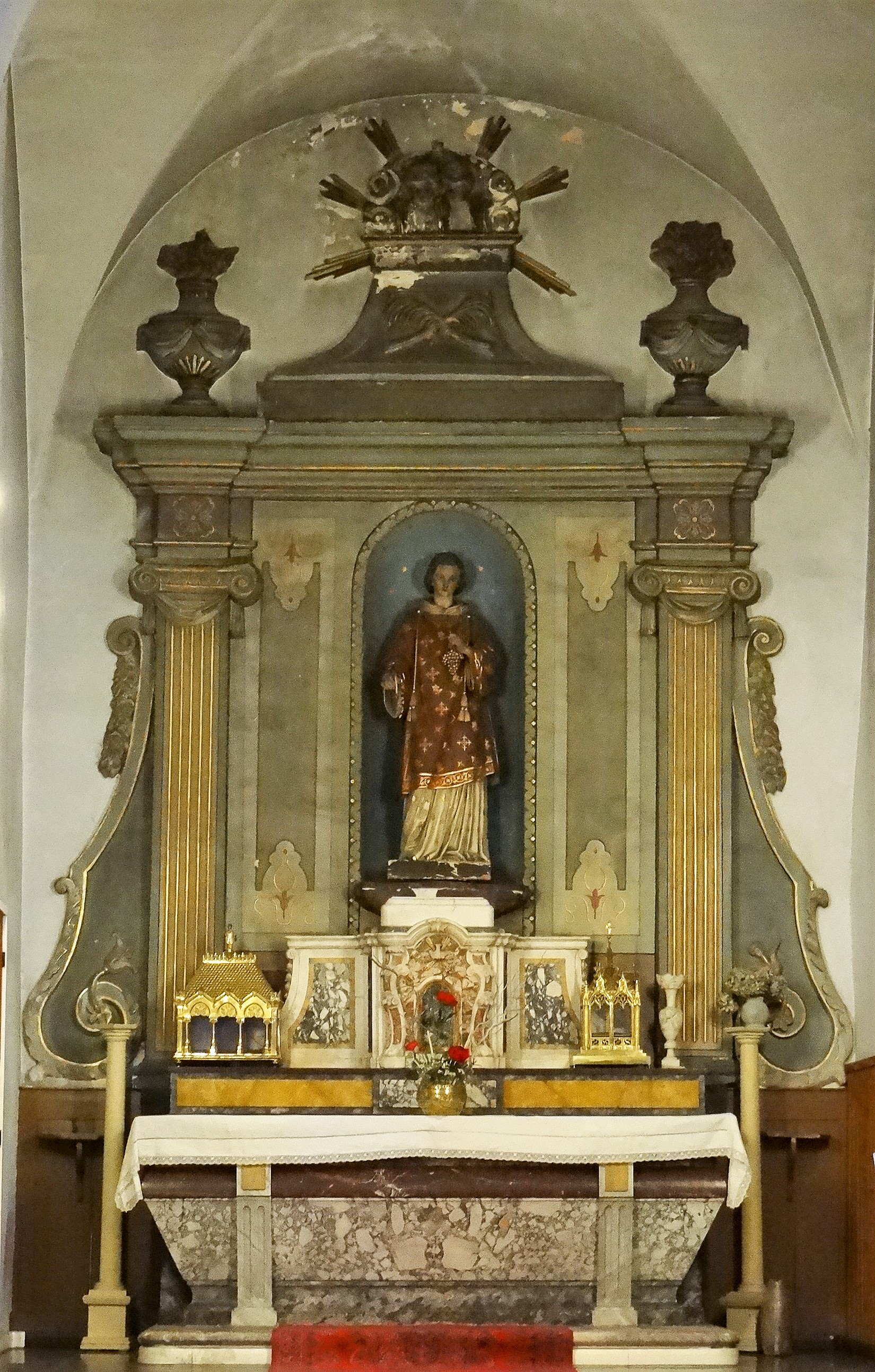 Ax-les-Thermes - Église Saint-Vincent - Chapelle et retable